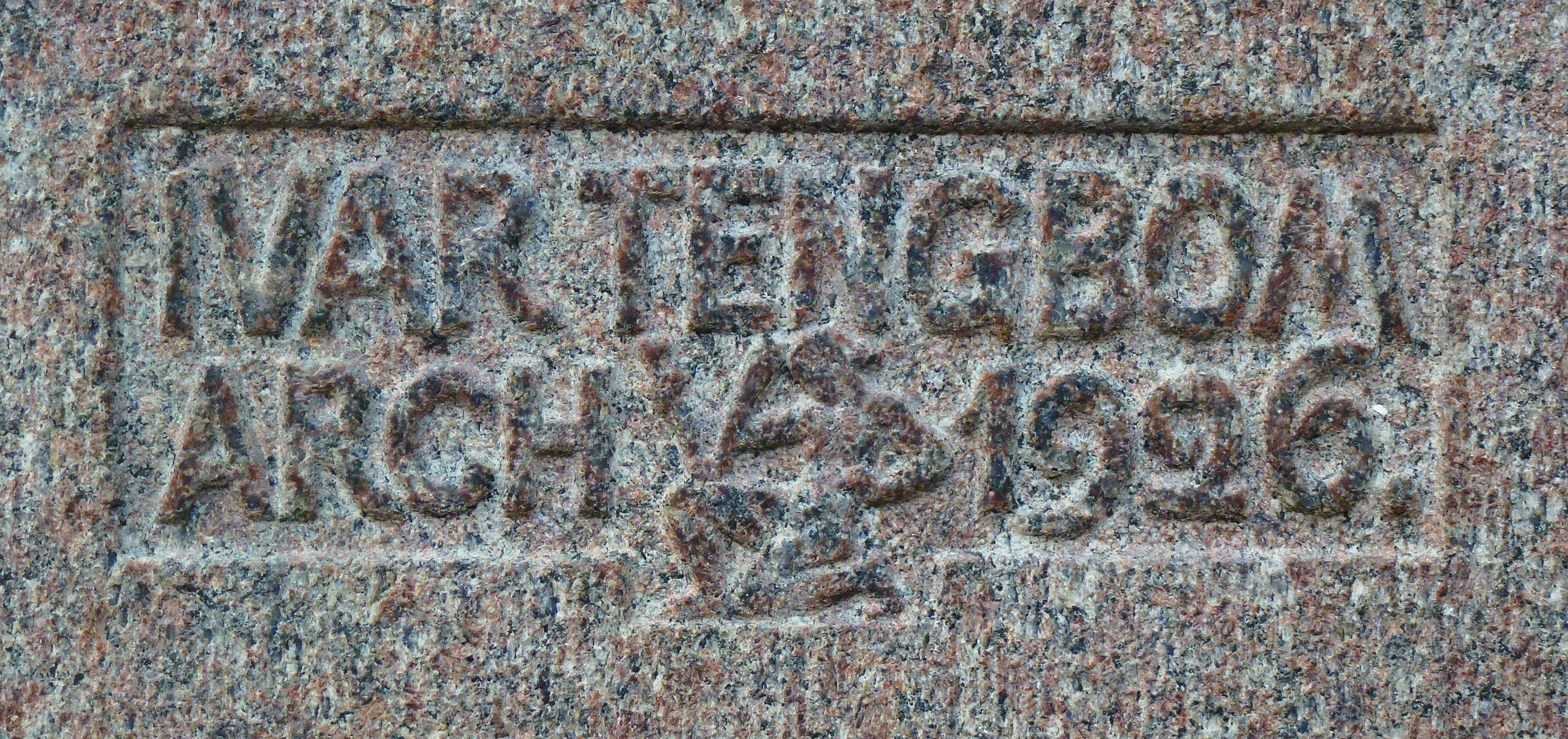 Ivar Tengboms "signatur" på Konserthuset